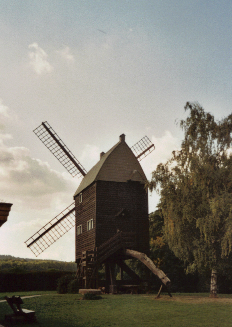 Bockwindmühle in Hildesheim-Marienrode